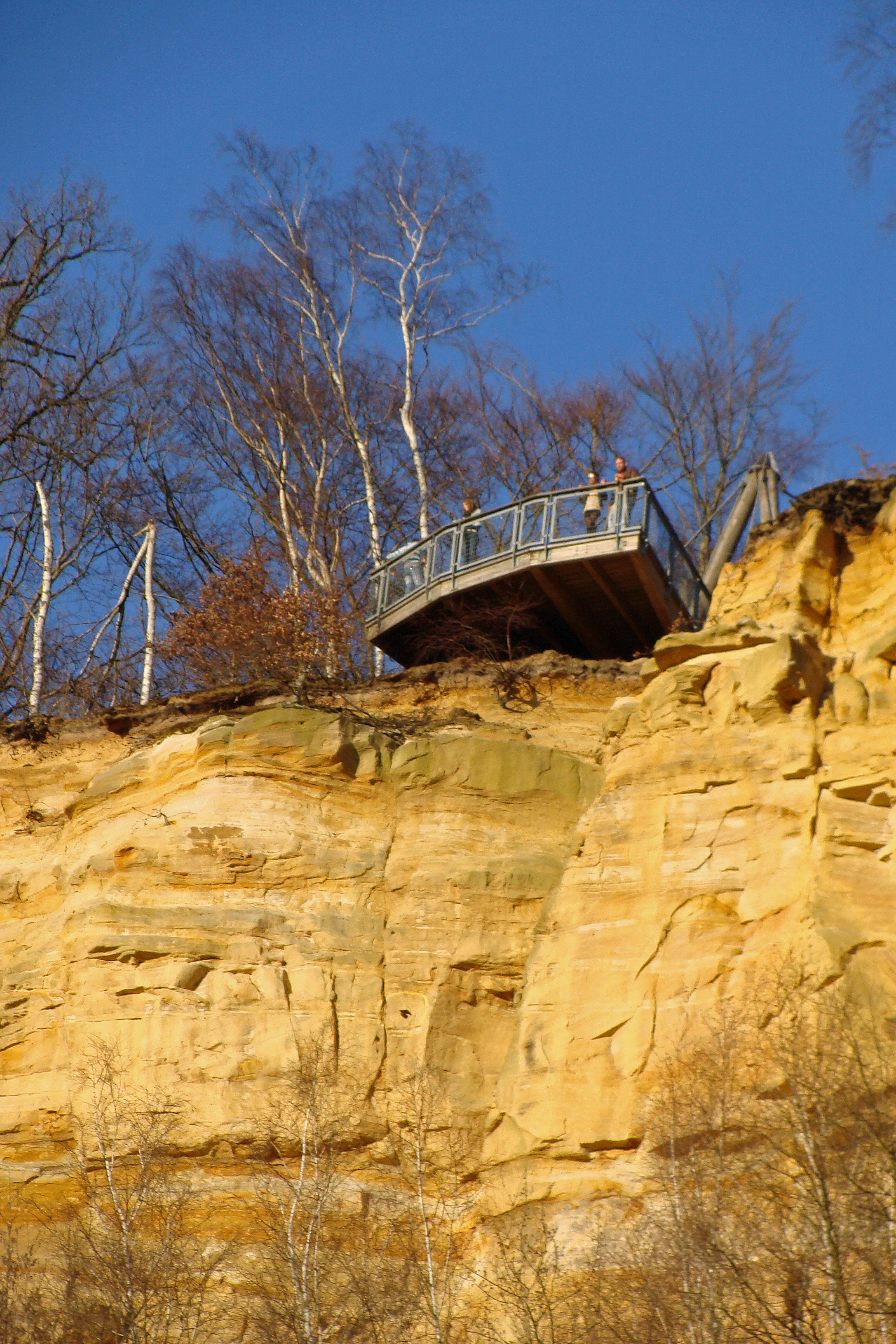 Plate-forme panoramique de la carrière du Barrois proche de Freyming-Merlebach. Photographie prise le 9 mars 2014.